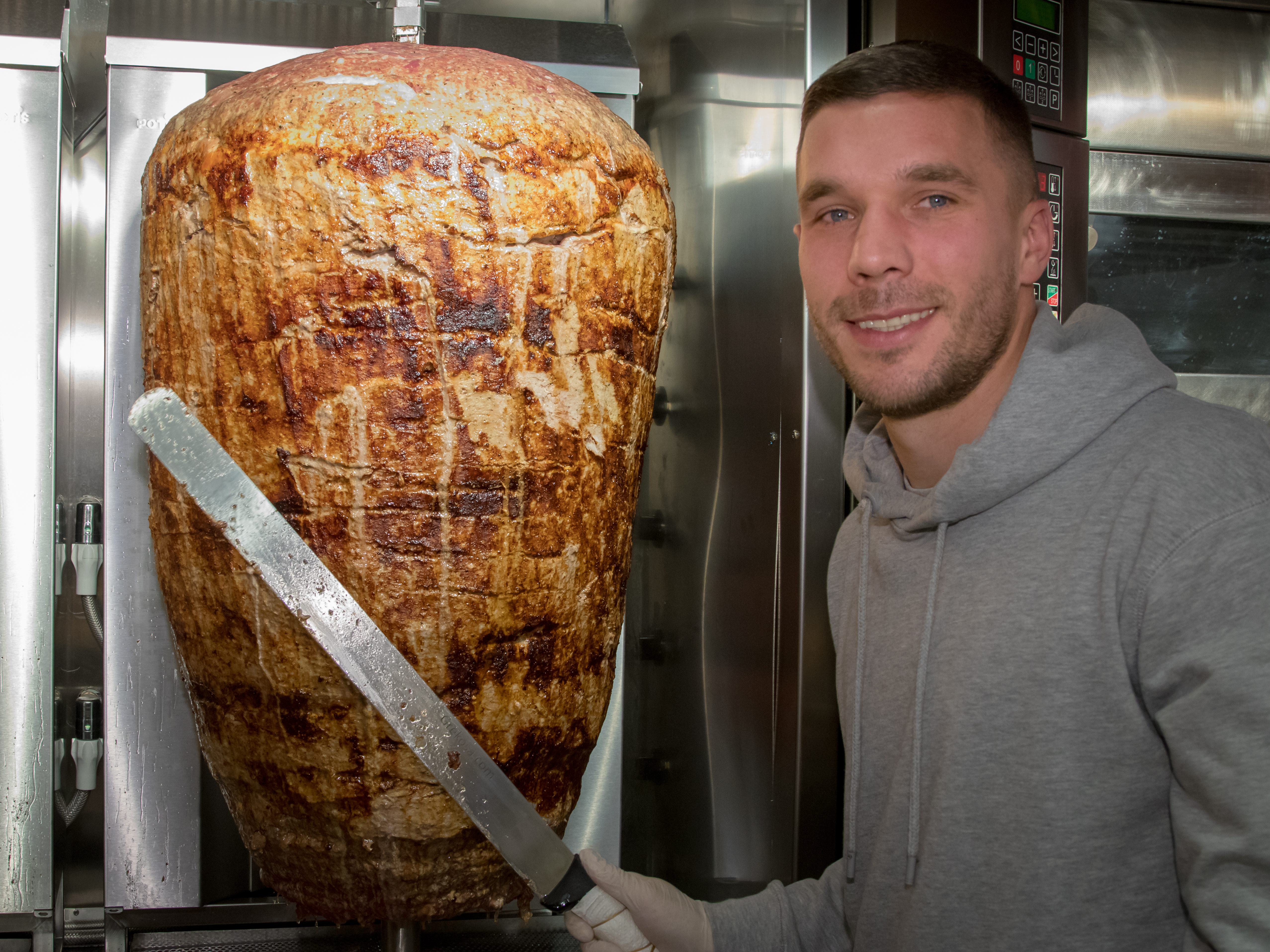 Eröffnung "Mangal Döner", Bonner Straße 1 am Chlodwigplatz in Köln mit dem Teilhaber Lukas Podolski